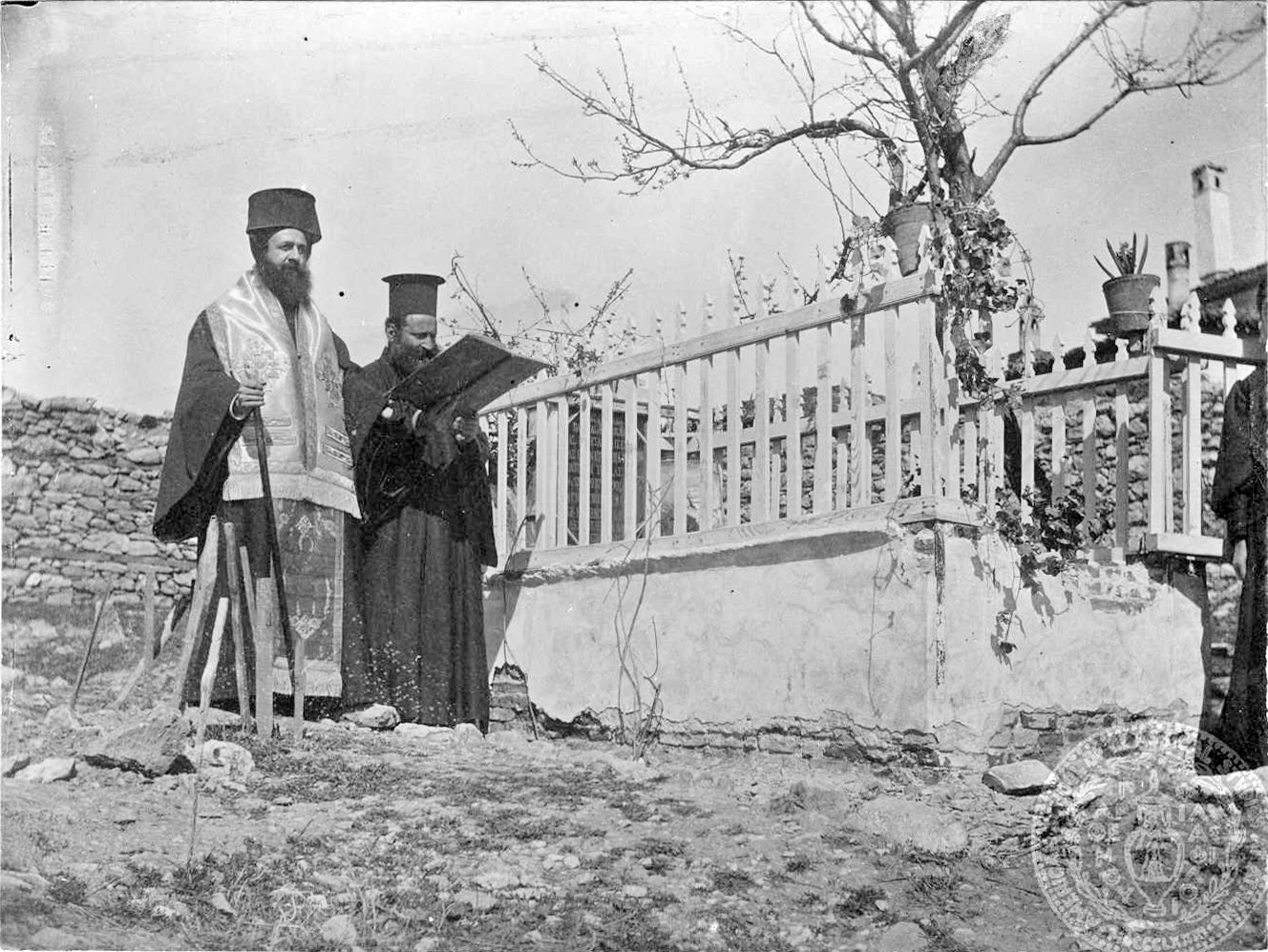 Германос Каравангелис и протосингел Платон на гроба на Павлос Мелас